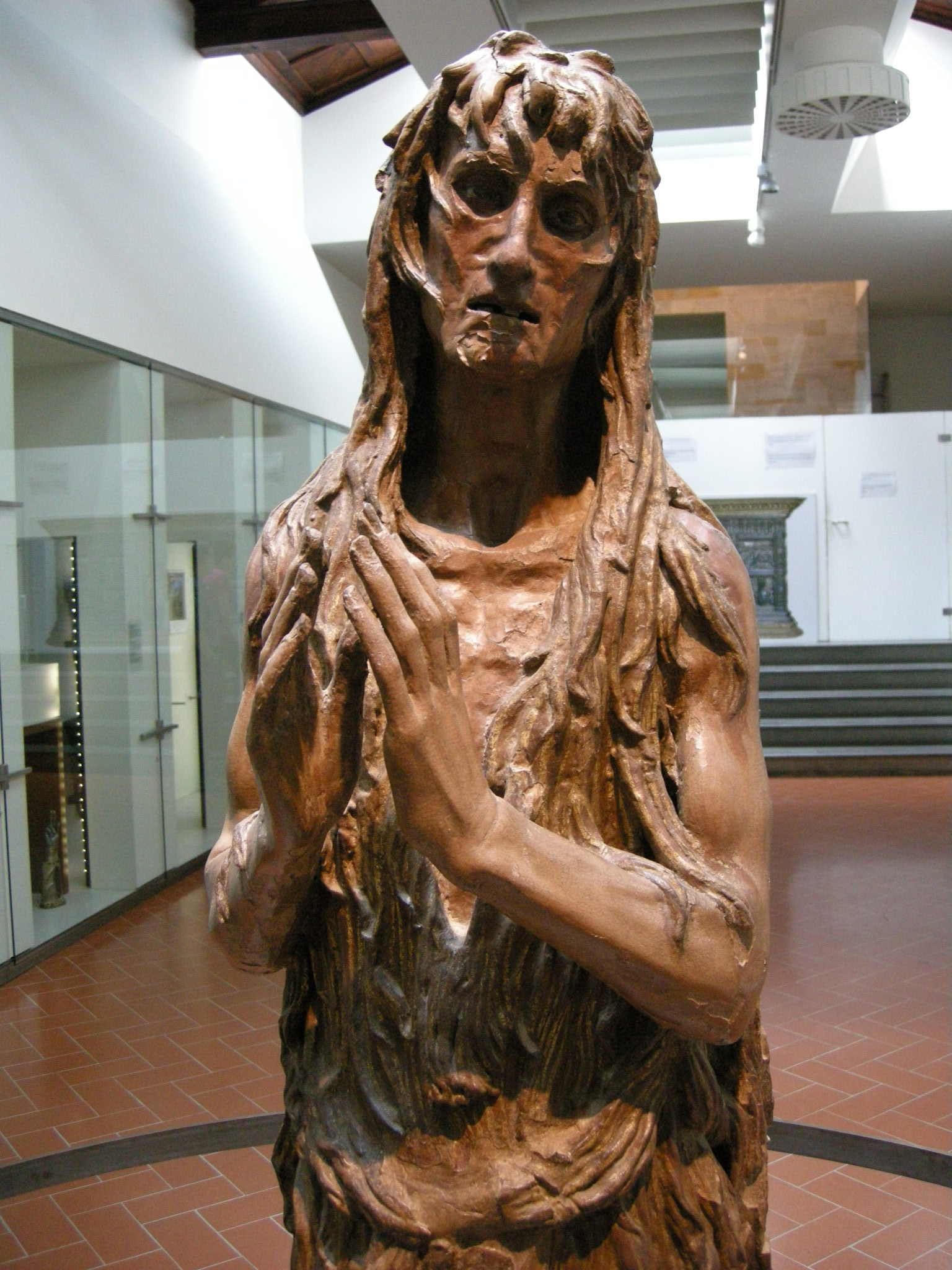 Donatello, maria maddalena